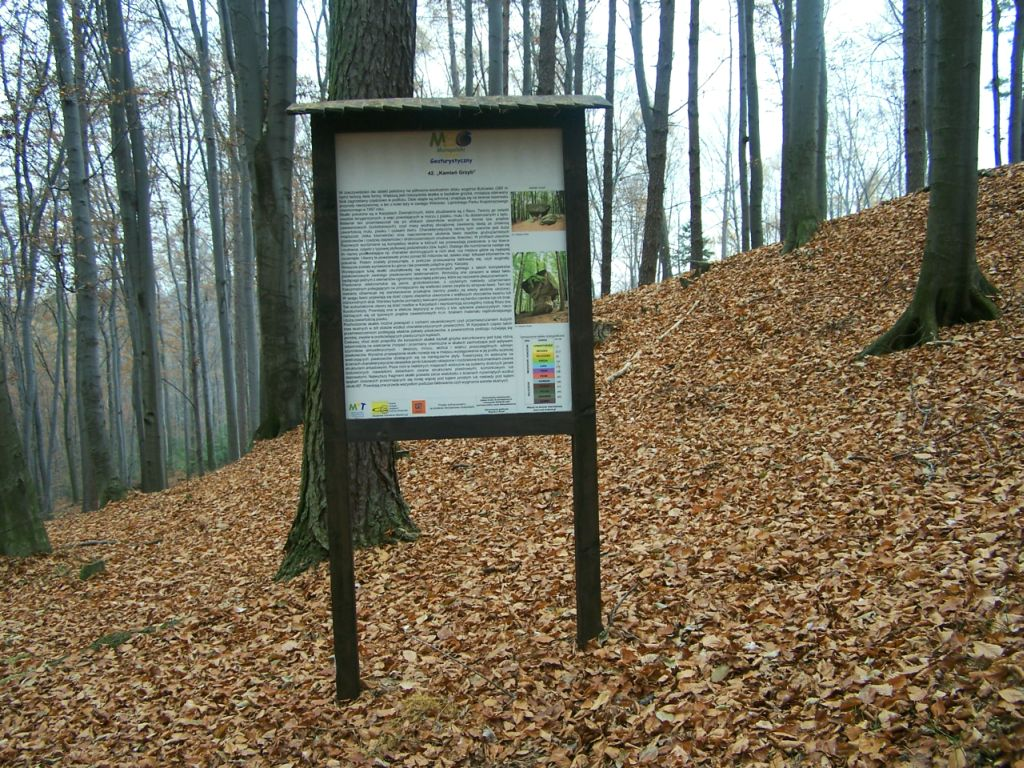 Nature reserve Kamień Grzyb